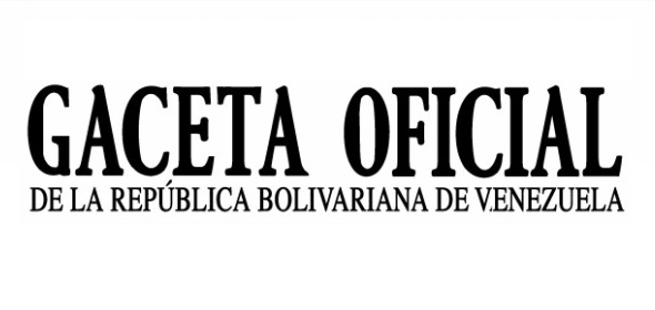 Logo de la Gaceta Oficial de Venezuela